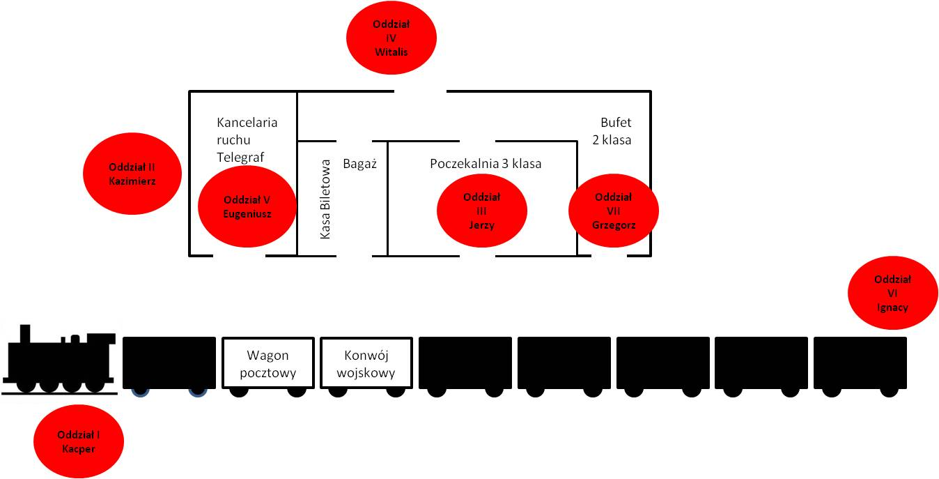 Plan akcji na stacji kolejowej Rogów 1908 na podstawie rysunku w "Niepodległości" n 3(7) 1937